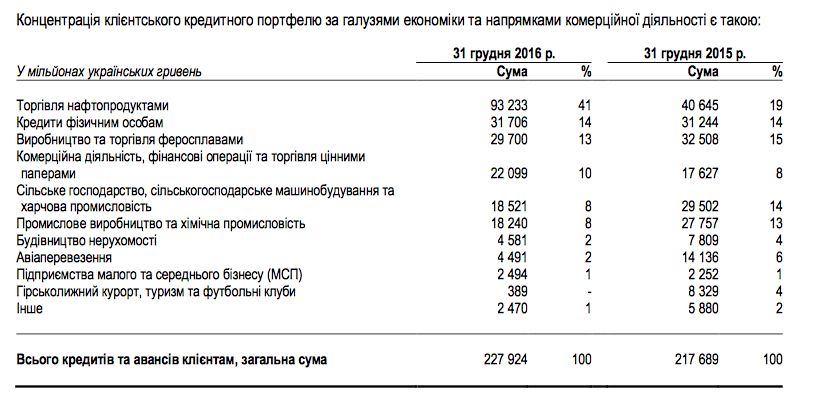 Концентрація клієнтського кредитного портфелю за галузями економіки та напрямками комерційної діяльності 31.12.2016